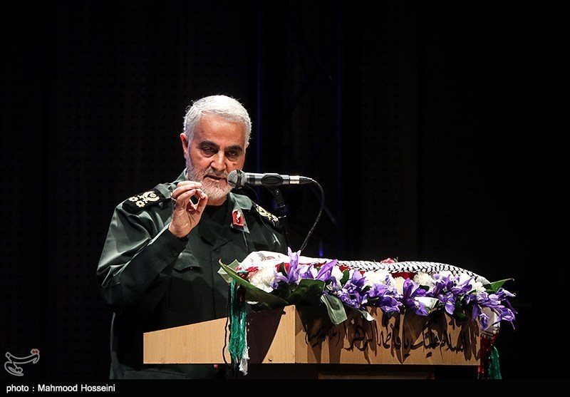 مراسم گرامیداشت دهمین سالگرد شهادت عماد مغنیه